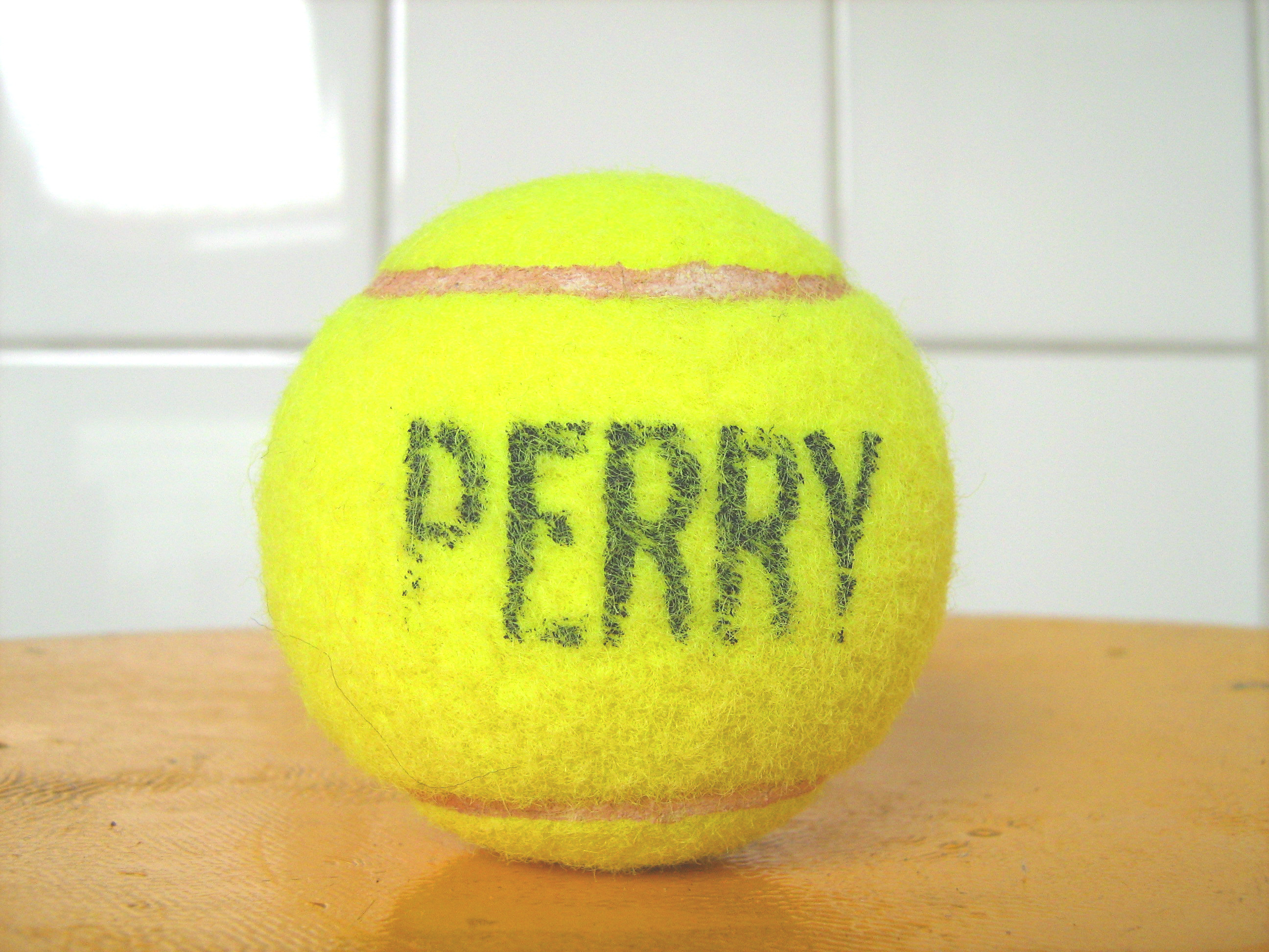 drukloze tennisbal merk Perry